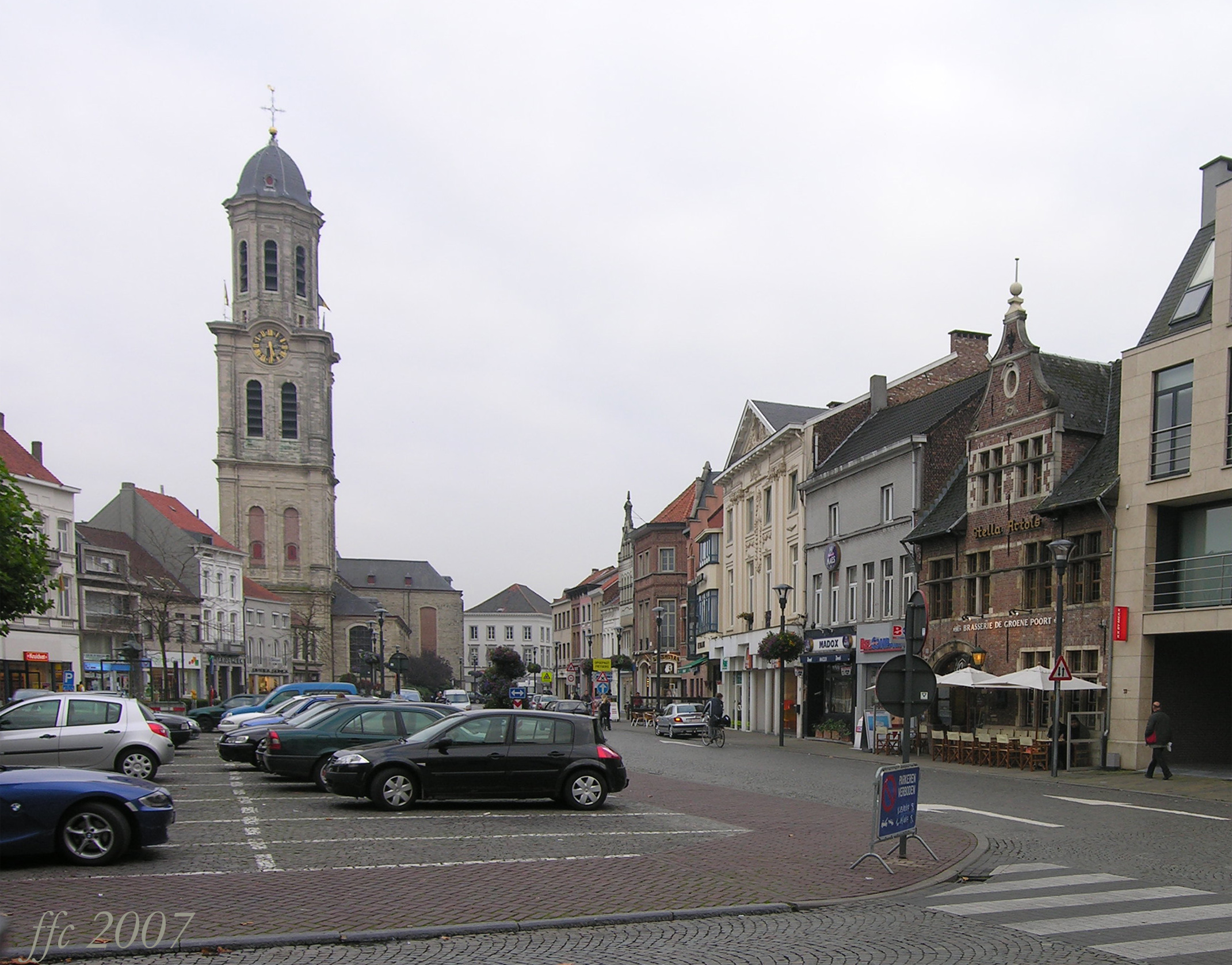 Kerkplein en Sint Laurentiuskerk Lokeren Plaça de l'Església Sant Lorenç